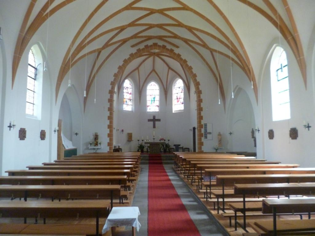 Querfurt, kath. Kirche St. Salvator, Innenraum